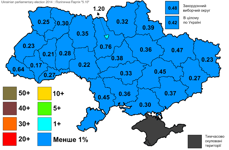 Результати виборів до Верховної Ради України, які відбулись 25 жовтня 2014 року. Інформація з офіційного сайту ЦВК. Політична Партія "5.10".